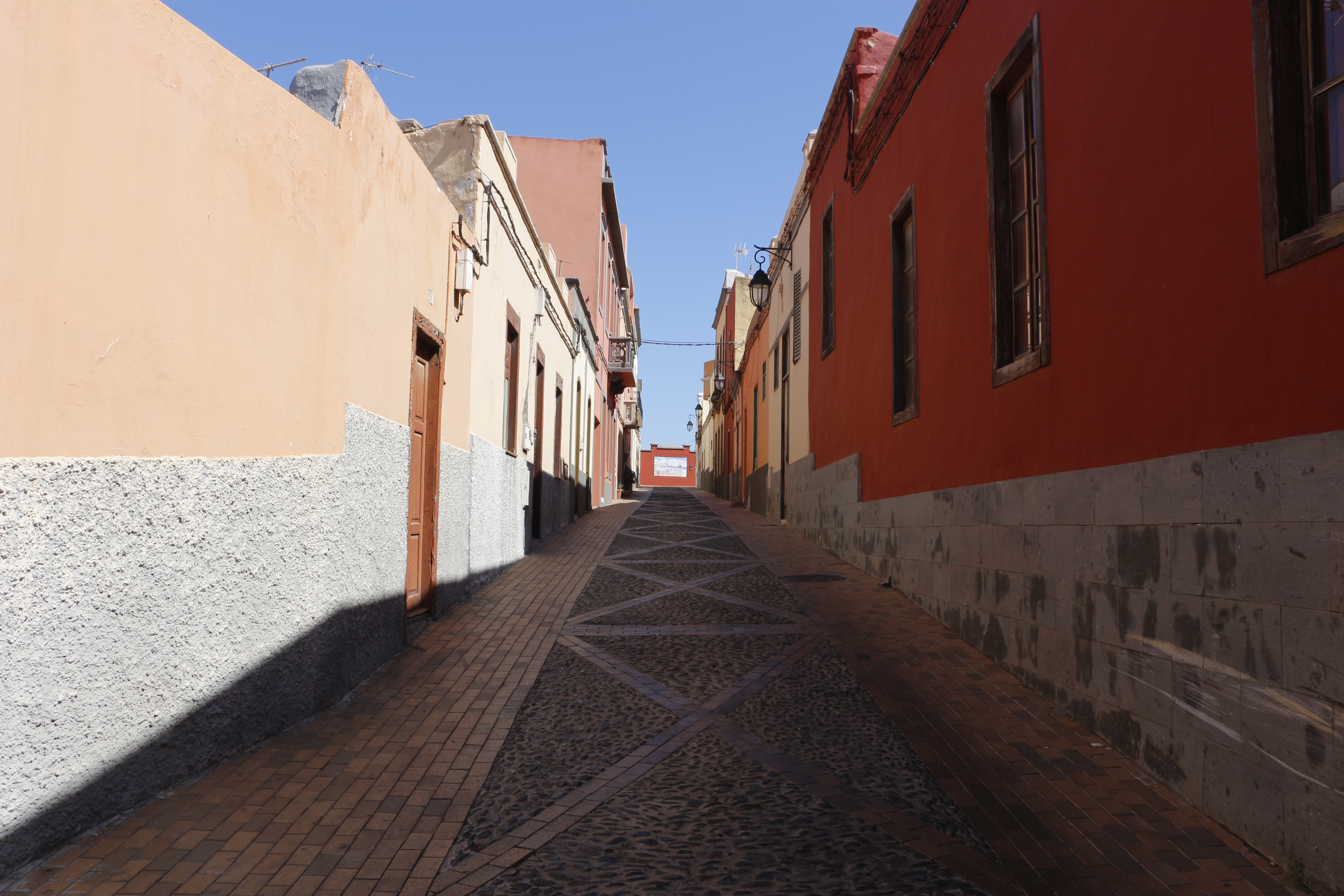 Calle Nueva, lugar de interés en Ingenio